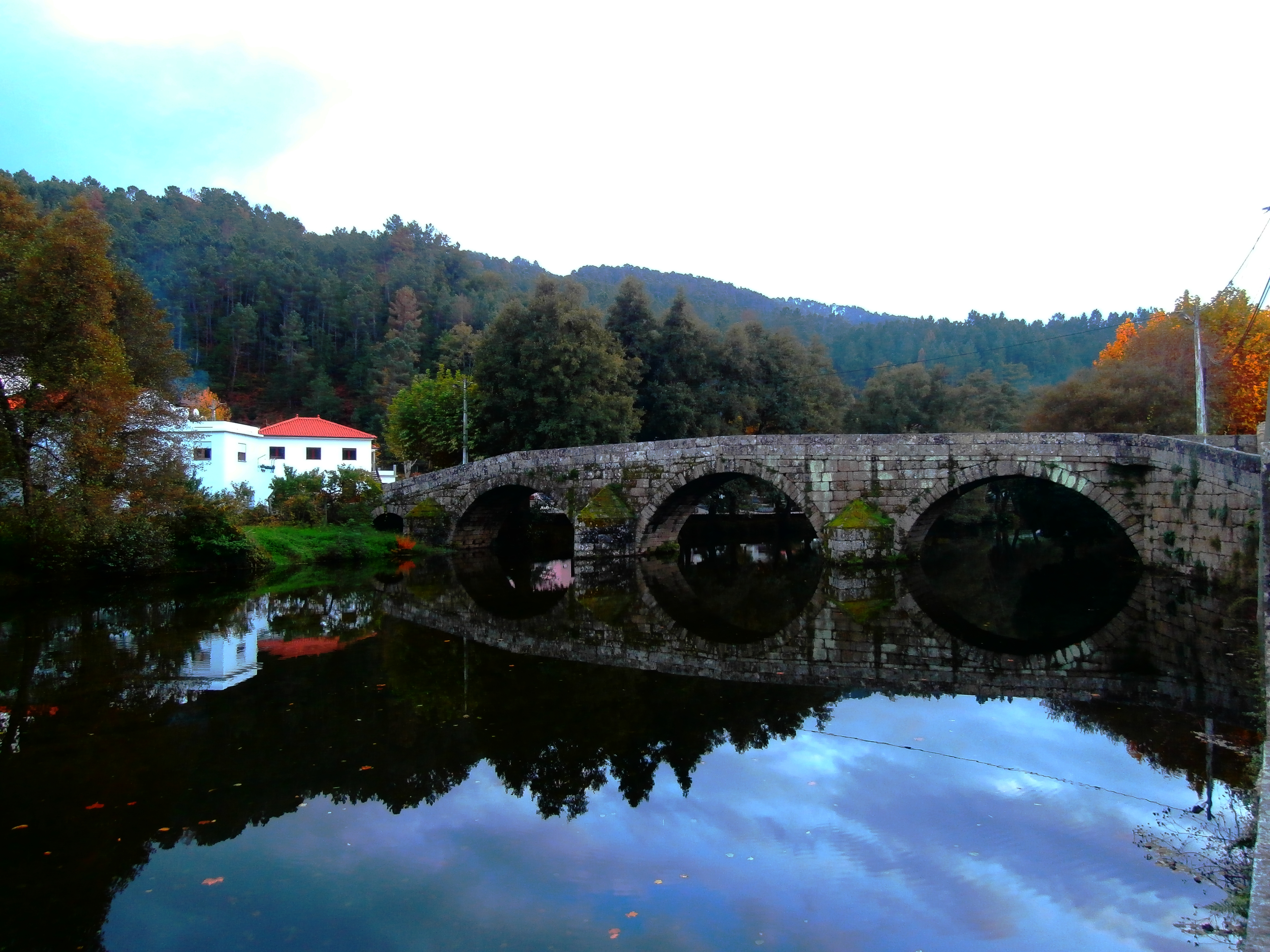 Ponte romana de Sandomil